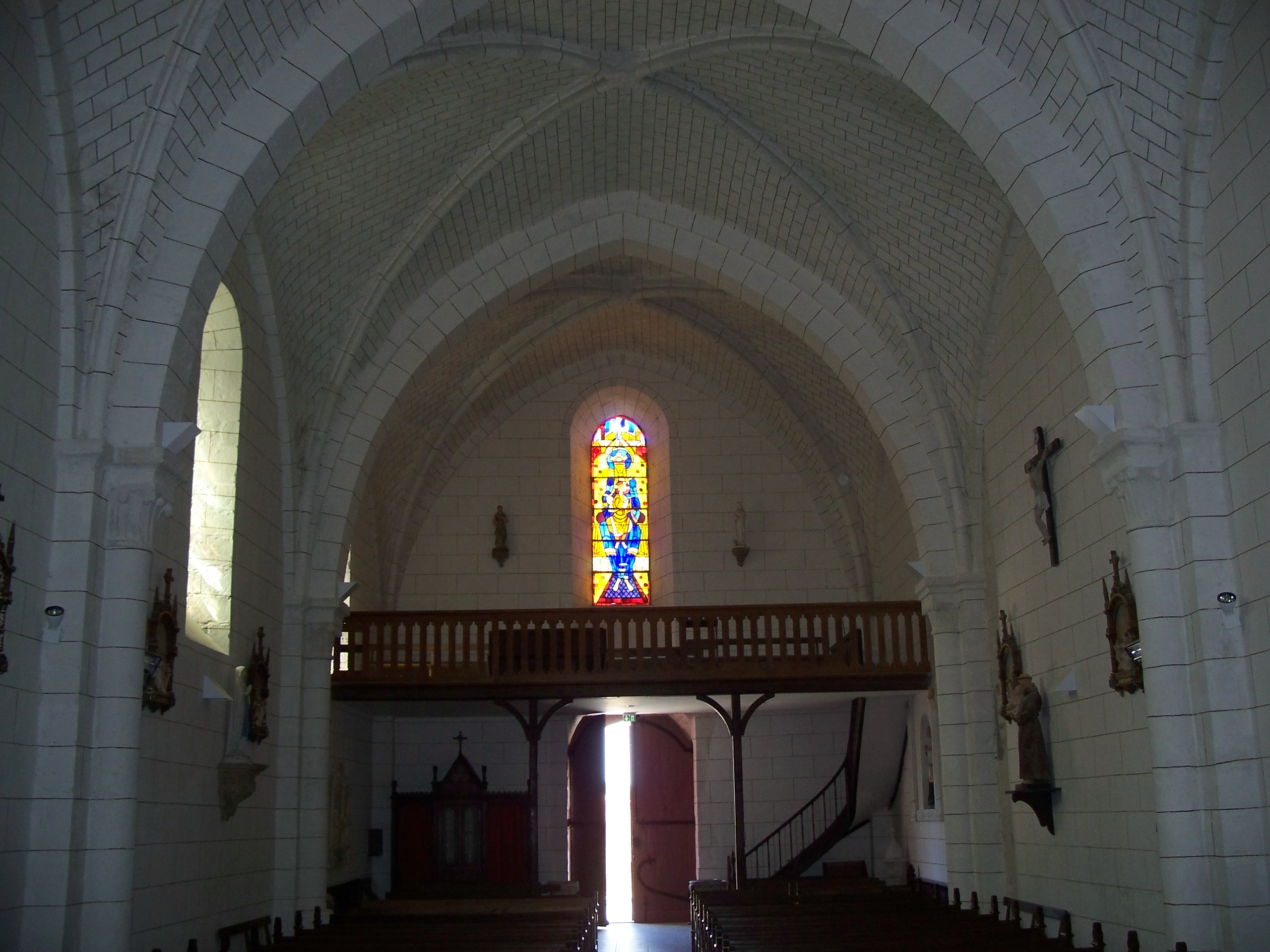 Église Saint-Léger de Virey (Inscrit) .